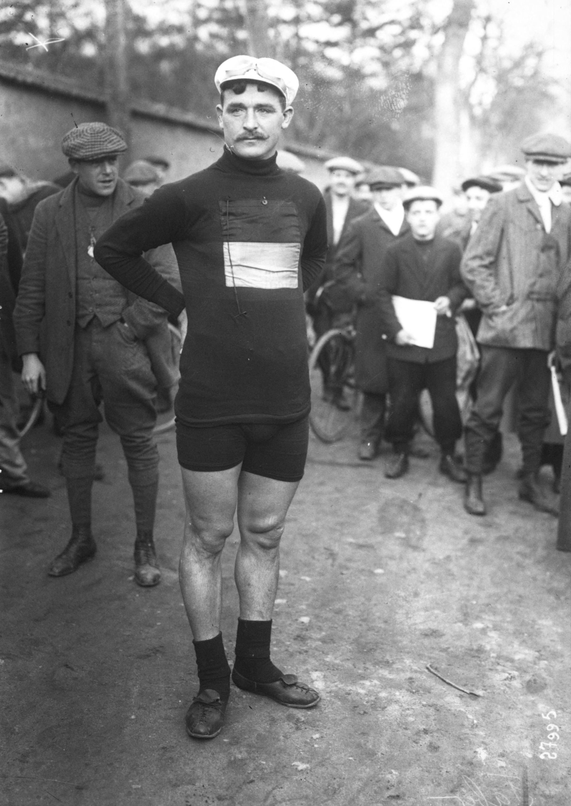 Faber [François, 23-03-13, portrait du gagnant du Paris-Roubaix, équipe Peugeot-Wolbert].